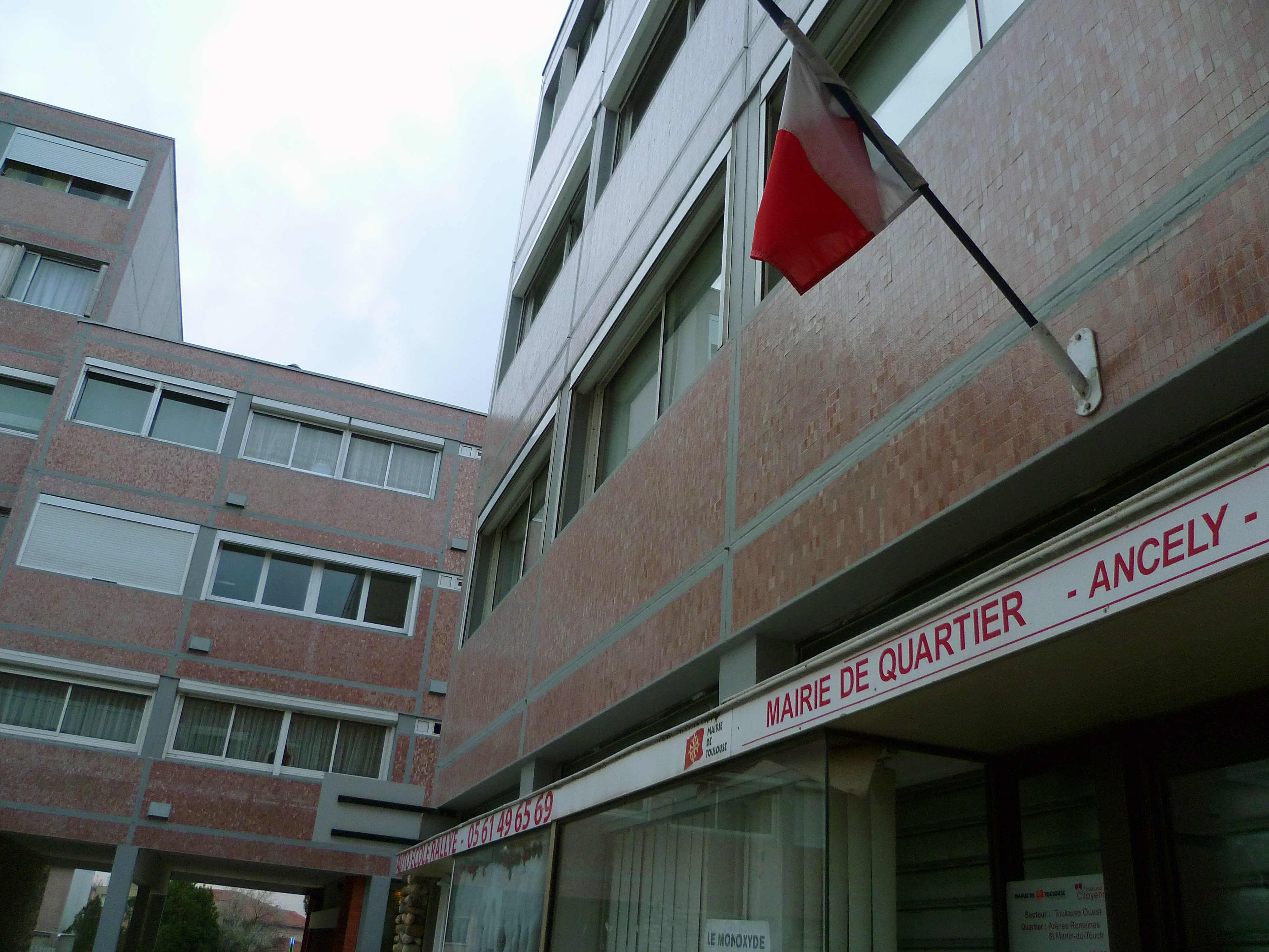 Toulouse, Haute-Garonne, France : Mairie annexe d'Ancely.